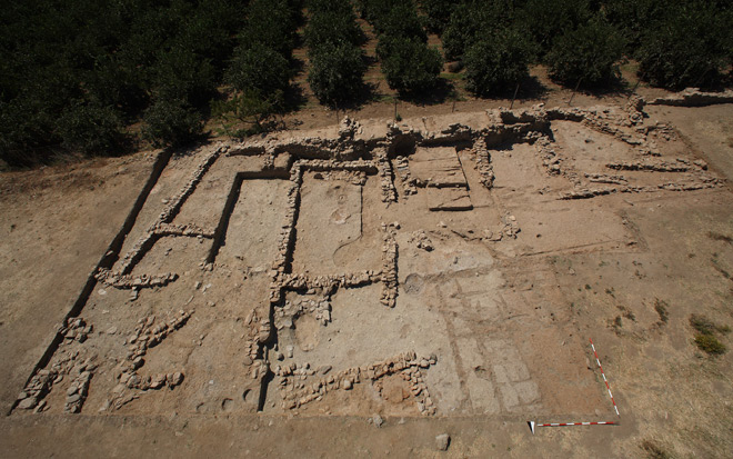 Die Siedlung vom Çukuriçi Höyük nach der Grabungskampagne 2009 (Foto N. Gail)